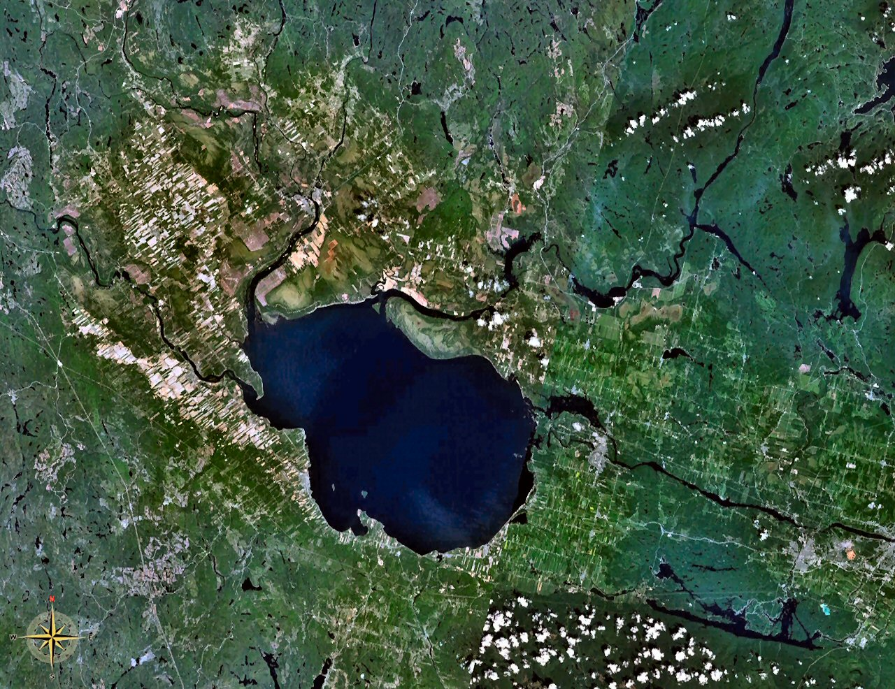 Lac Saint Jean, Quebec, Canada